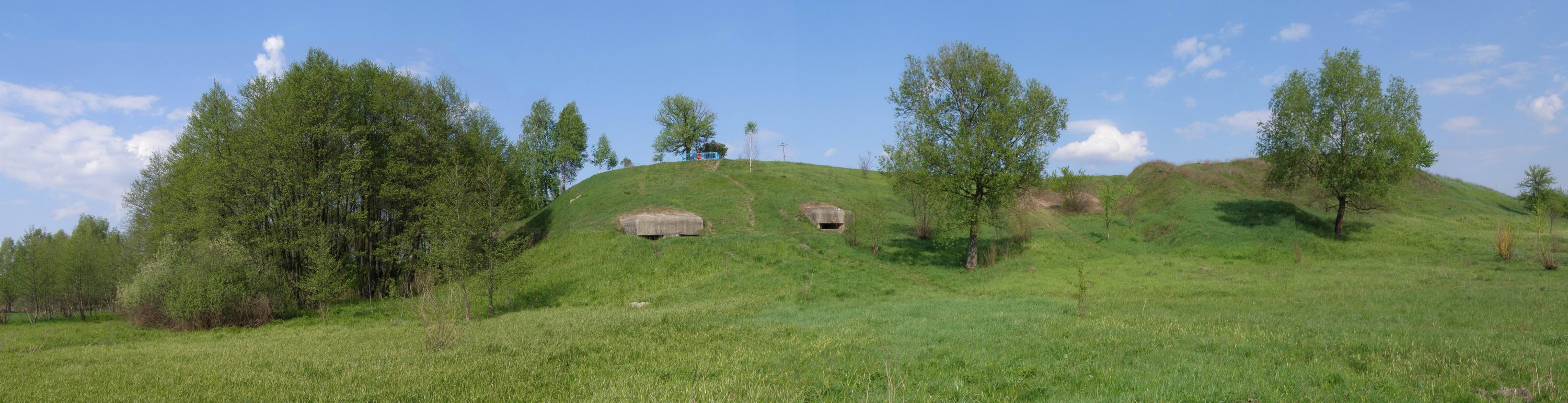 Дот 205